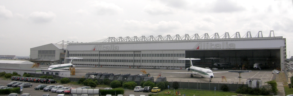 Bilder vom Flughafen Fiumicino